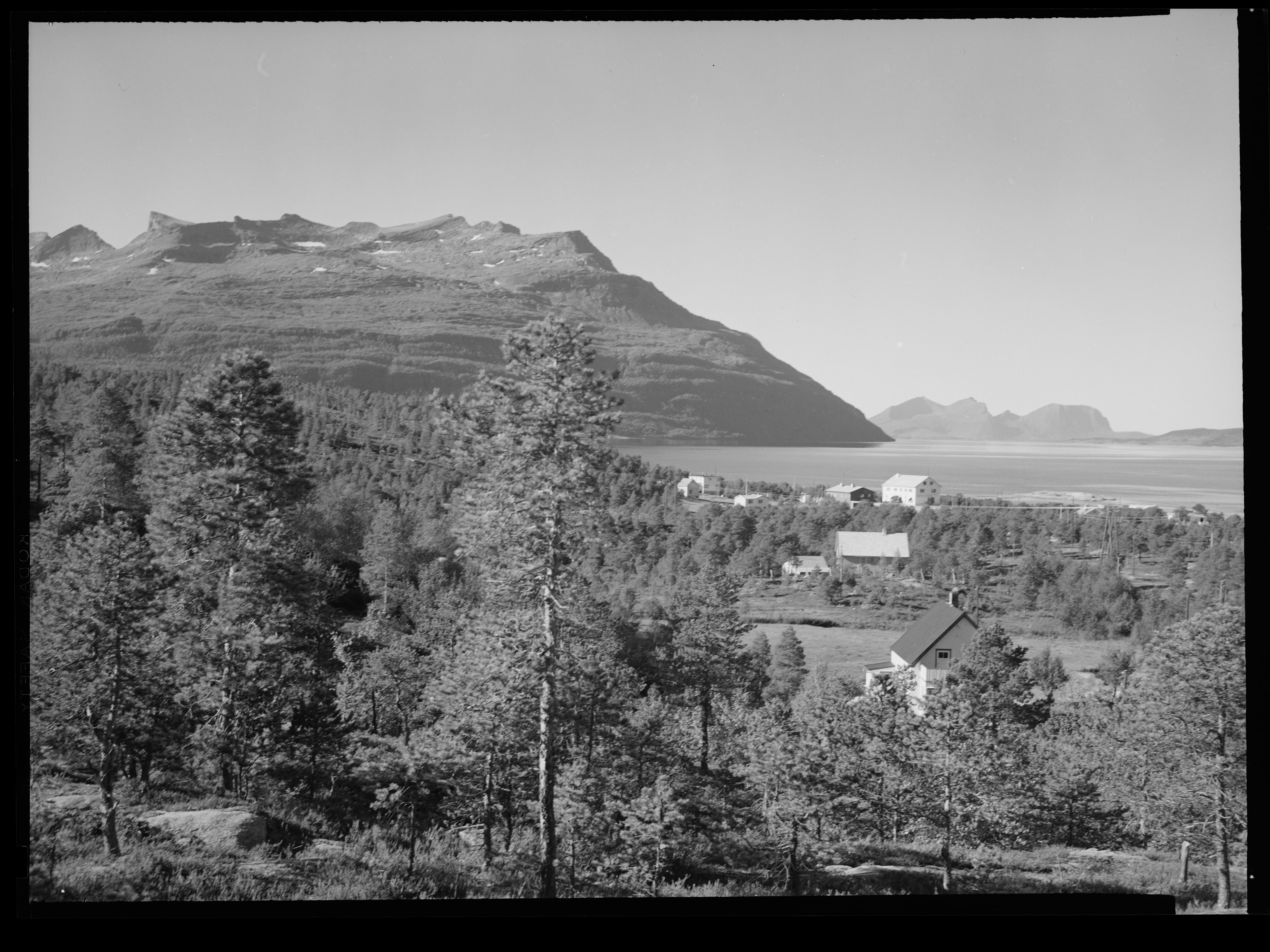 Bildet er hentet fra Nasjonalbibliotekets bildesamling. Anmerkninger til bildet var: Fotograf: Ukjent Innhavet, Hamarøy, Nordland